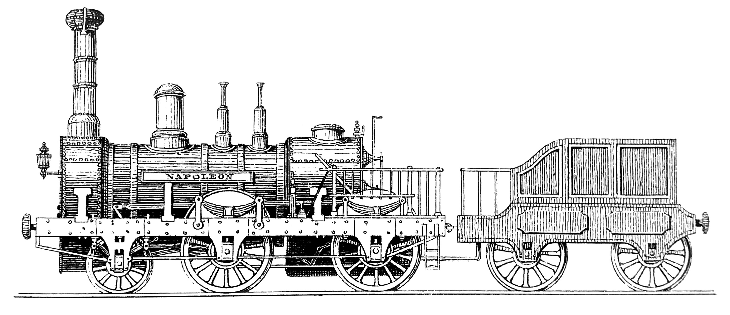 Locomotive Thann des ateliers Stehelin & Huber (par erreur, la locomotive porte le nom "Napoléon").